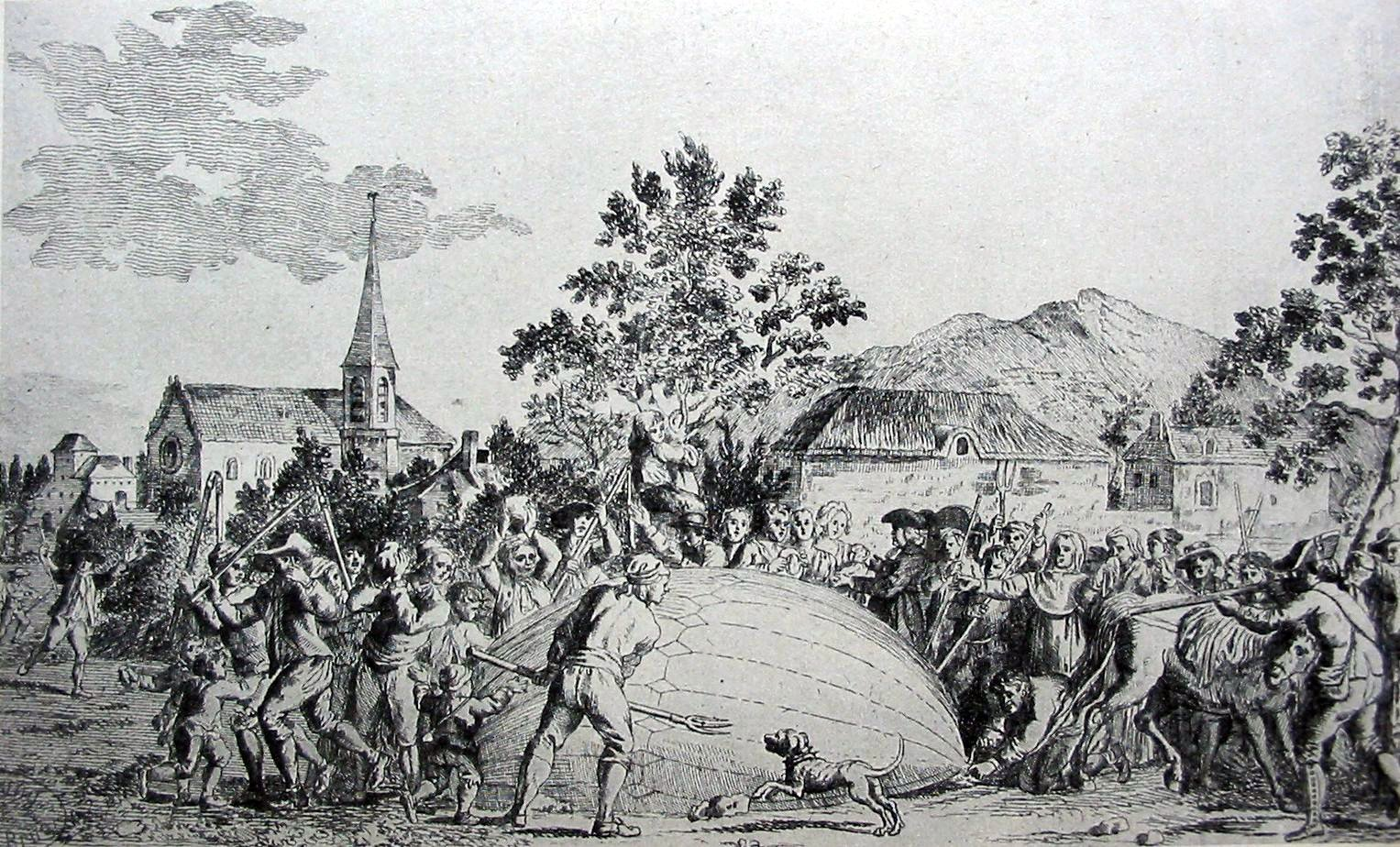 Der bei Genosse geplatzt niedergehende Wasserstoffballon des Pariser Prof. Charles erregt unter den Einwohnern einen Aufstand. Unter Führung der Geistlichkeit stürzen sie sich auf das Teufelsgerät und machen ihm der Garaus. Flugblatt aus dem Jahre 1783.